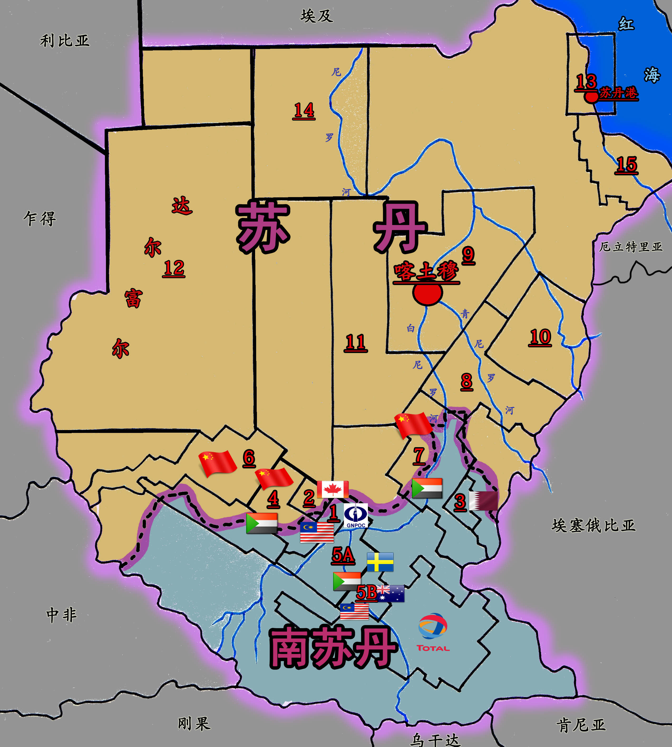 苏丹石油图.jpg